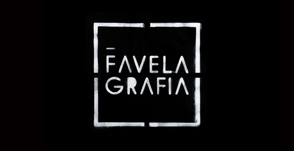 Identidade visual do projeto